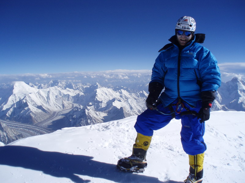 vrcholova fotografie z vrcholu K2 ze dne 20.07.2007